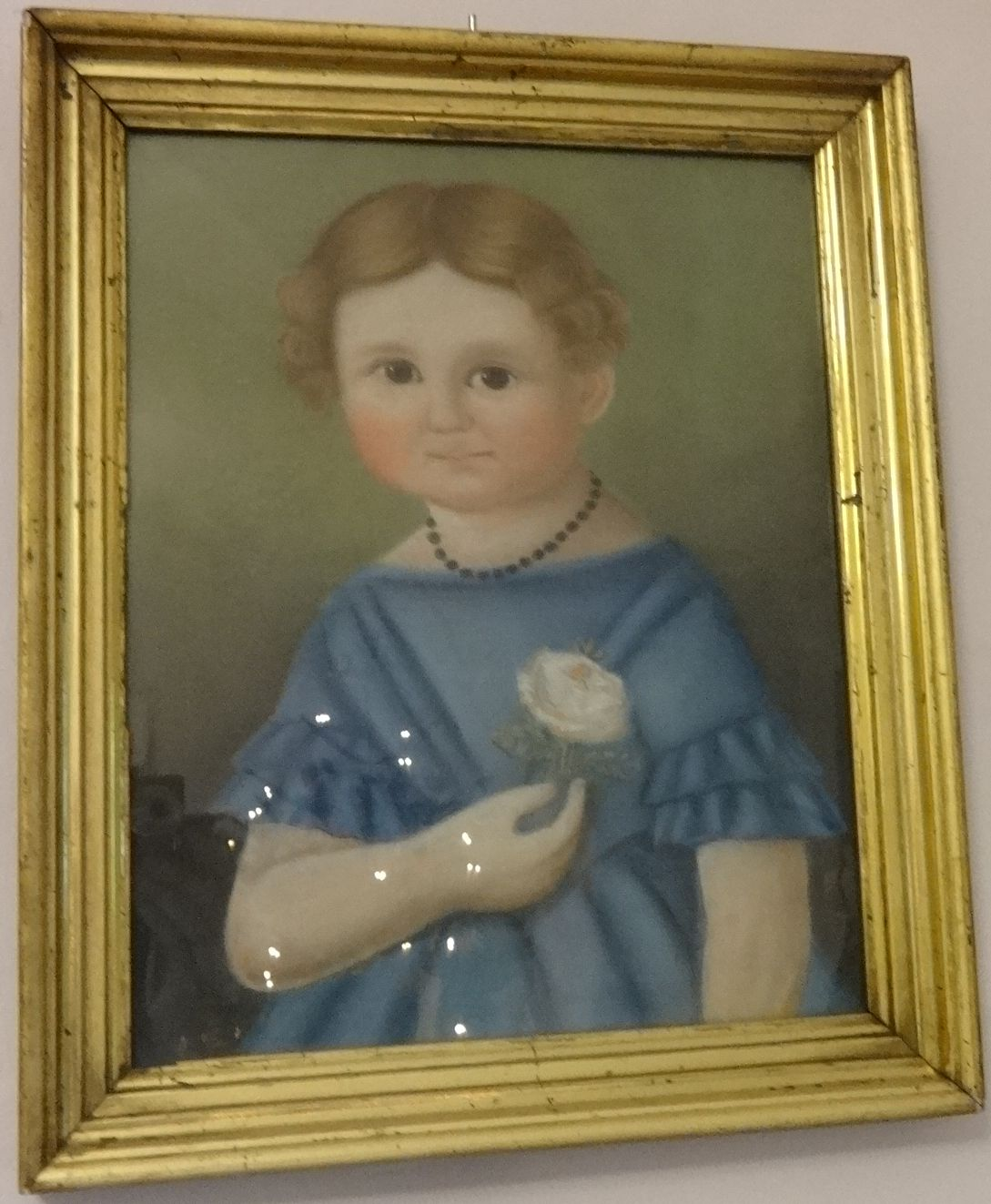 Kinderbildnis der Agnes Seyffert, geb. Friedrich, der Mutter von Oskar Seyffert Sachsen, 2. Hälfte des 19. Jahrhunderts, Pastellkreide auf Papier